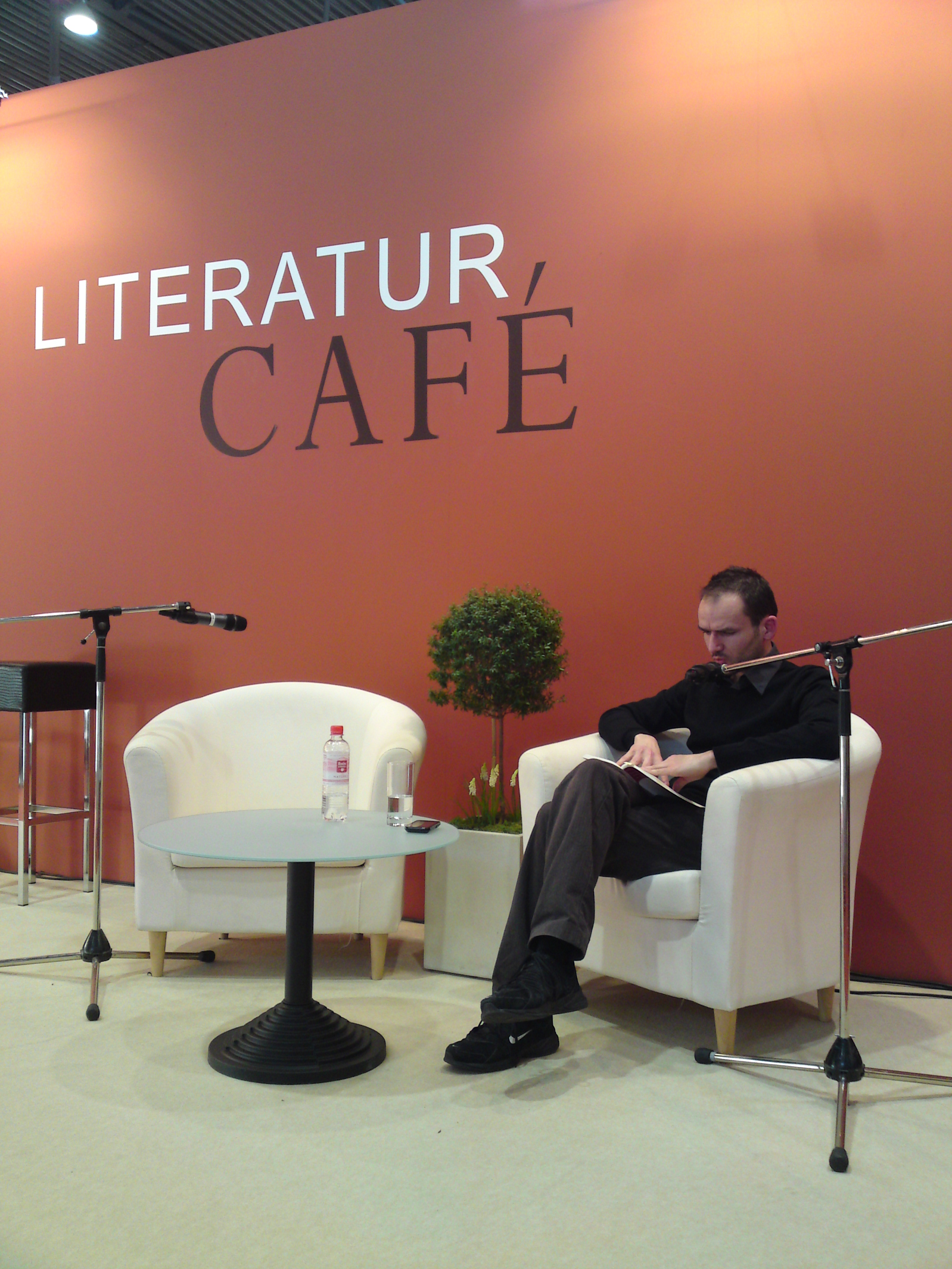 Lesung auf der Leipziger Buchmesse 2012